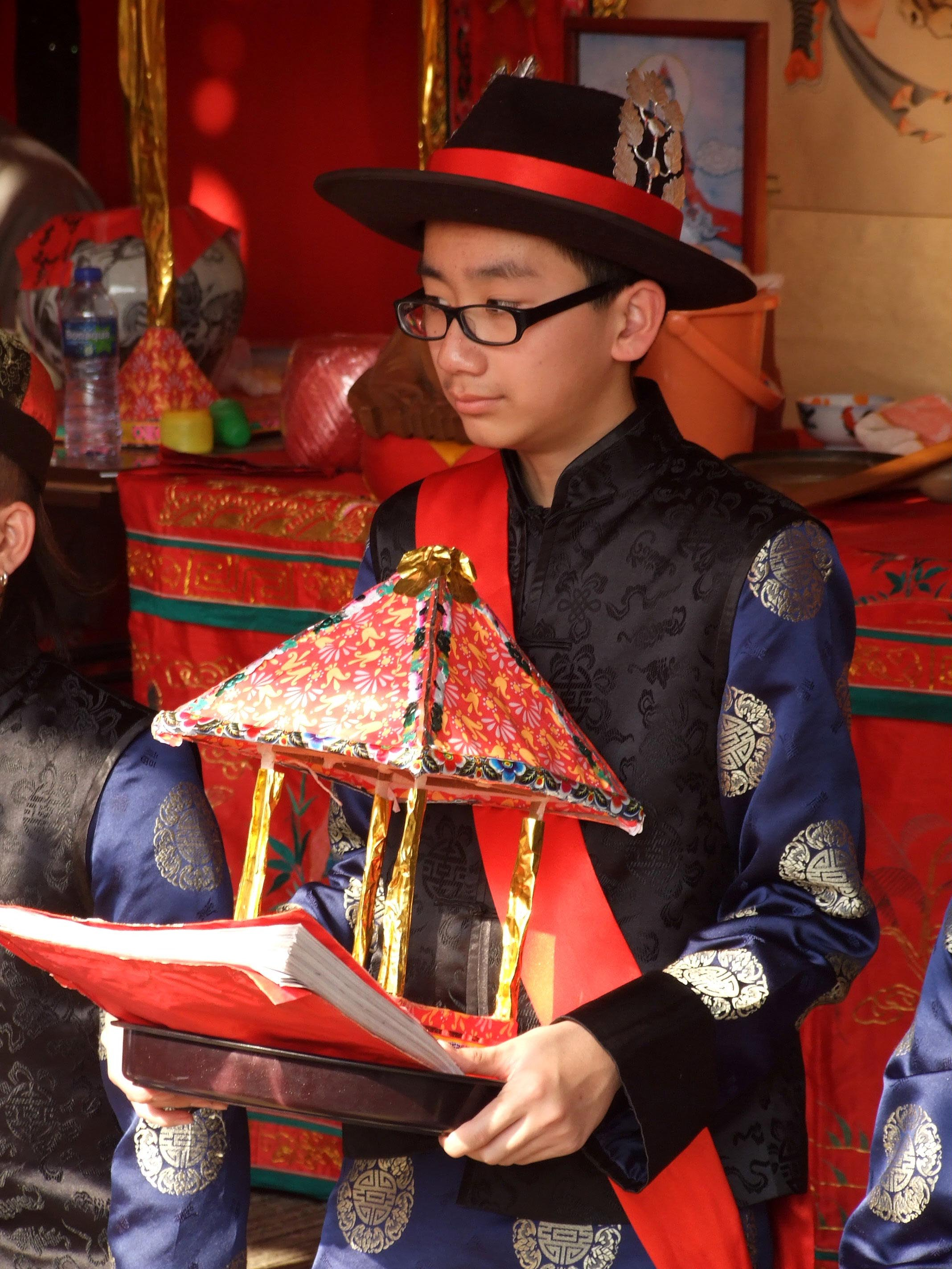 中文（香港）: 粉嶺太平清醮「頭名緣首」手捧「意者」和「意亭」